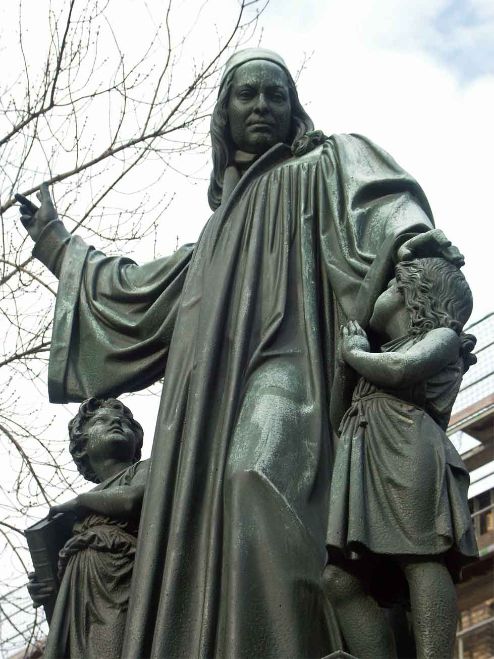 Denkmal für August Hermann Francke (1663-1727) im sog. Lindenhof der Franckesche Stiftungen Halle